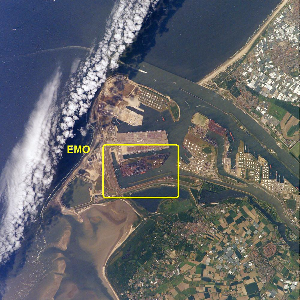 Europees Massagoed Overslagbedrijf op de Maasvlakte 28 mei 2005. Foto NASA Gebaseerd op nl::Afbeelding:Rotterdamse haven.jpg Categorie:Lucht-satelietfoto Rotterdam